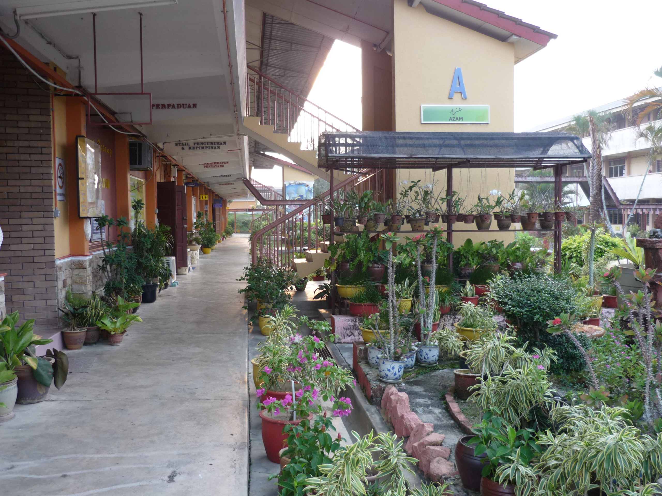 Laluan koridor SMKDA